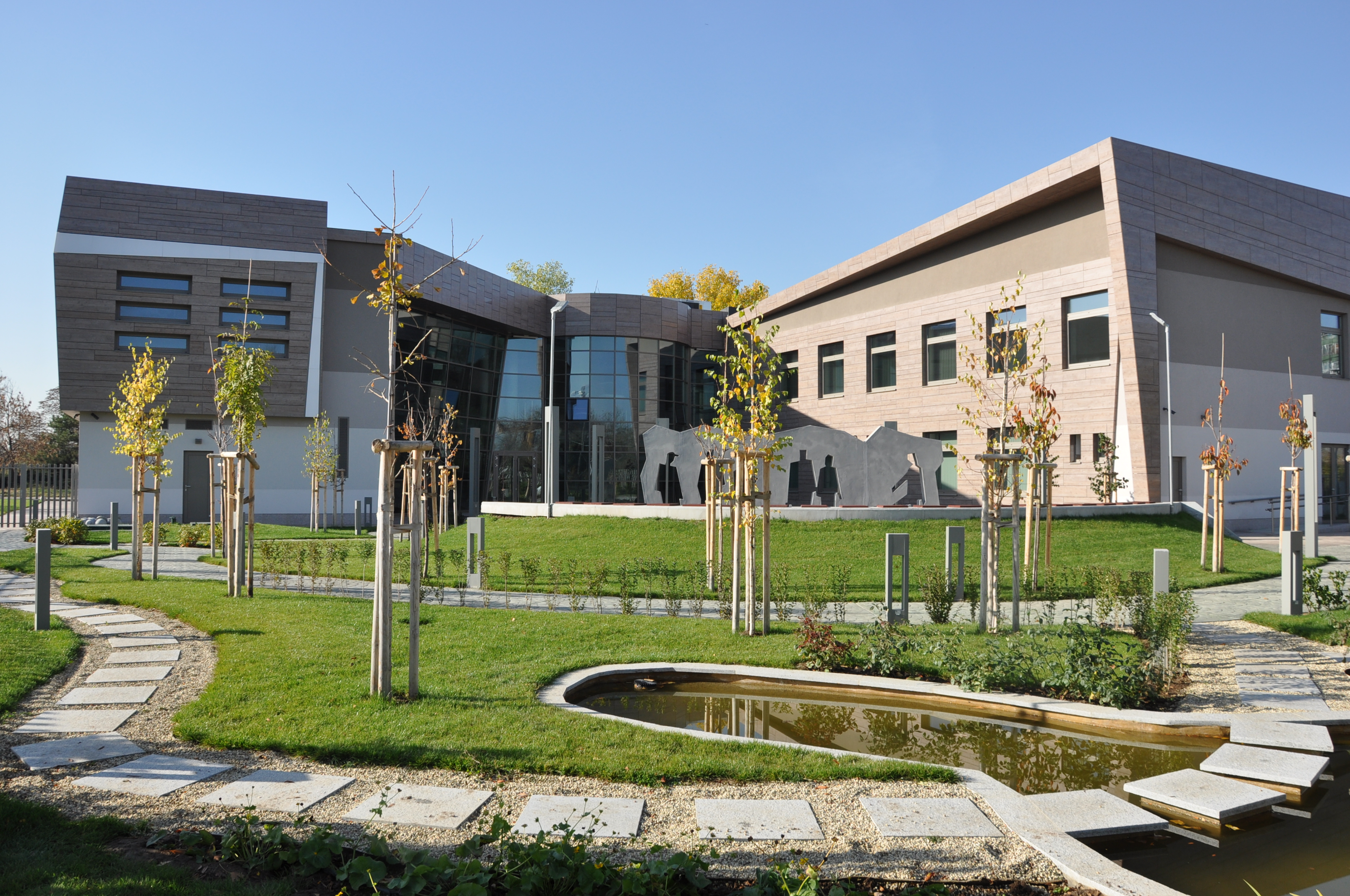 ЕВУИМ София